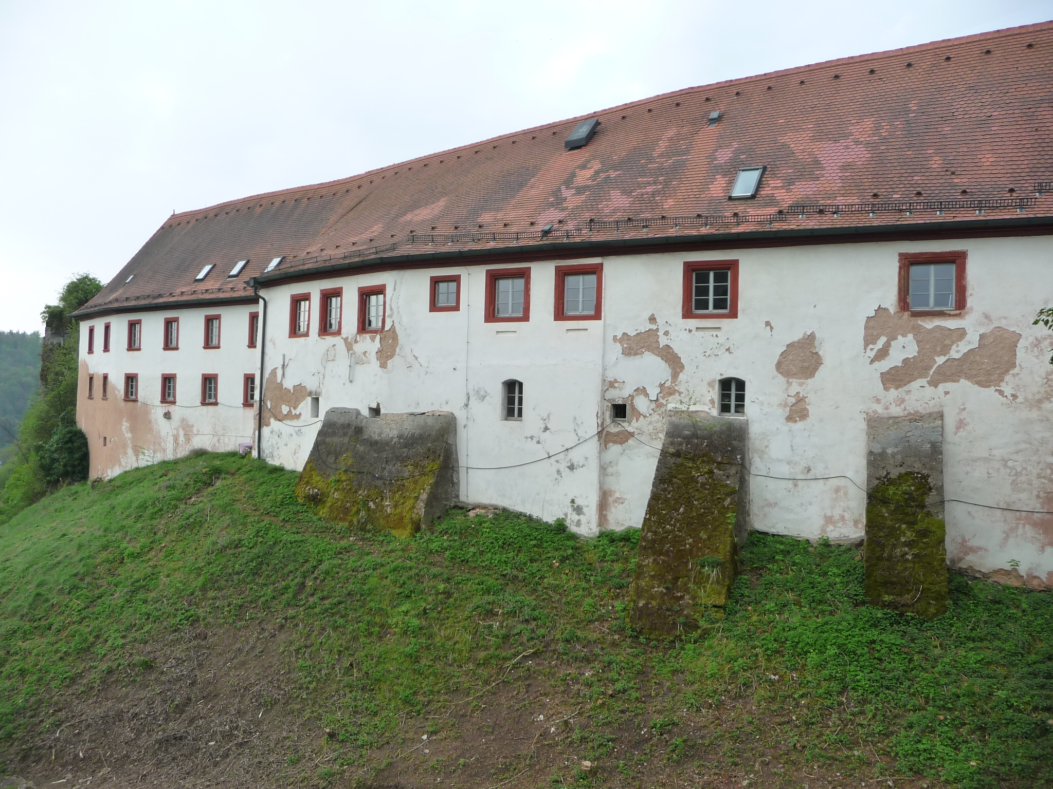 Burg Waischenfeld, Fränkische Schweiz (Oberfranken)